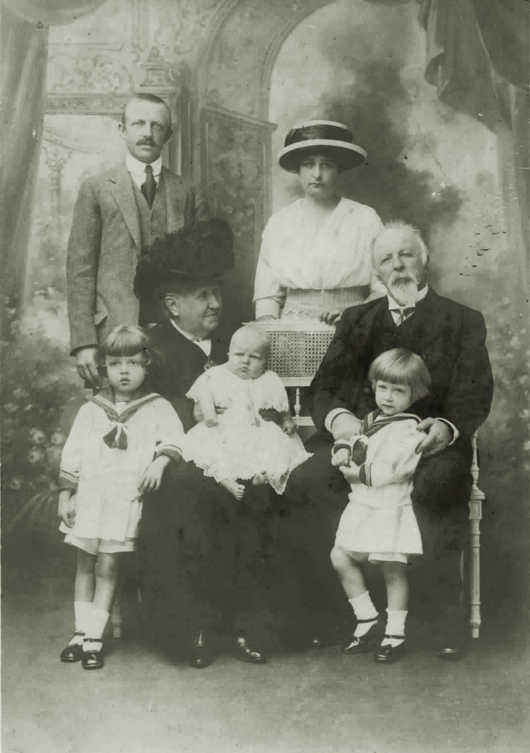 Luís, Príncipe Imperial do Brasil com a esposa e filhos em companhia de seus pais, Isabel, imperatriz de jure do Brasil e Gaston d´Orléans, conde d´Eu.